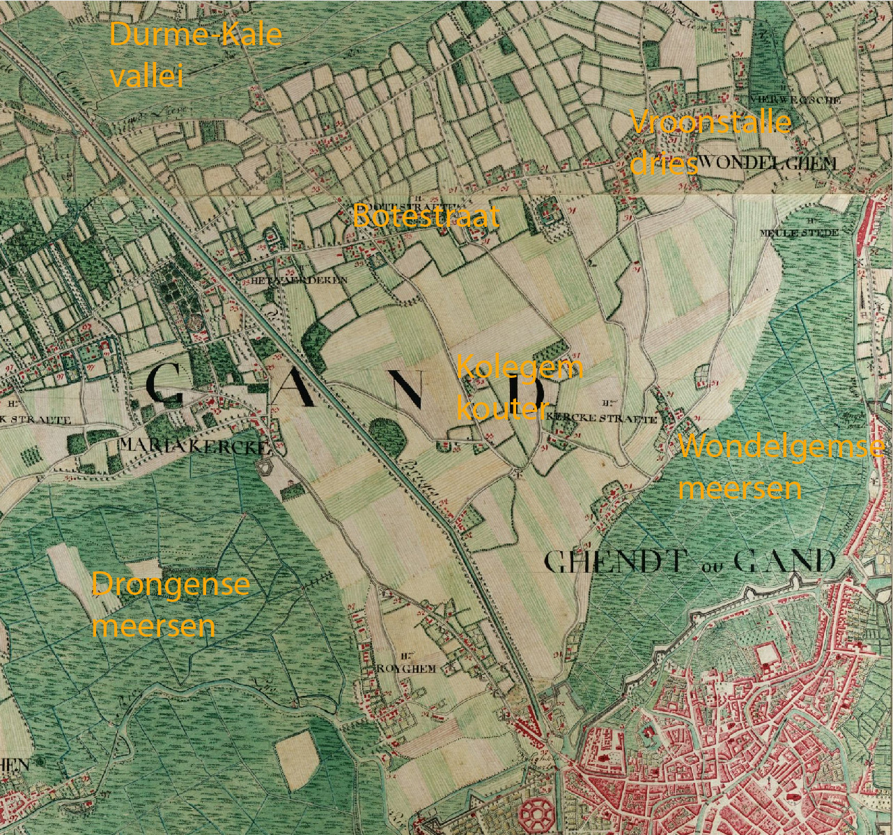 Situering van de Kolegemkouter en het omliggende meersengebied op een kaart uit circa 1775